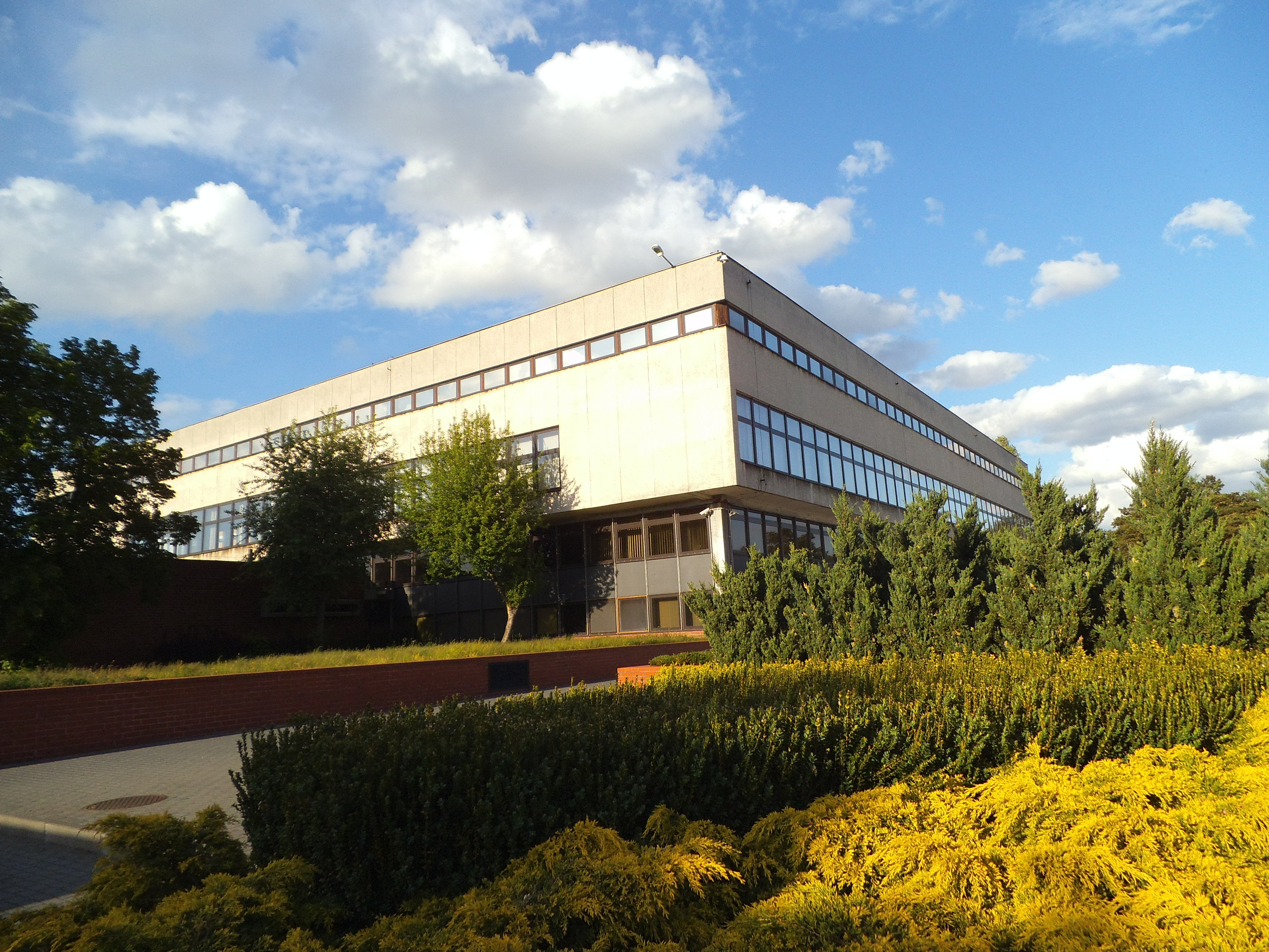 Biblioteka UMK - Bieleny